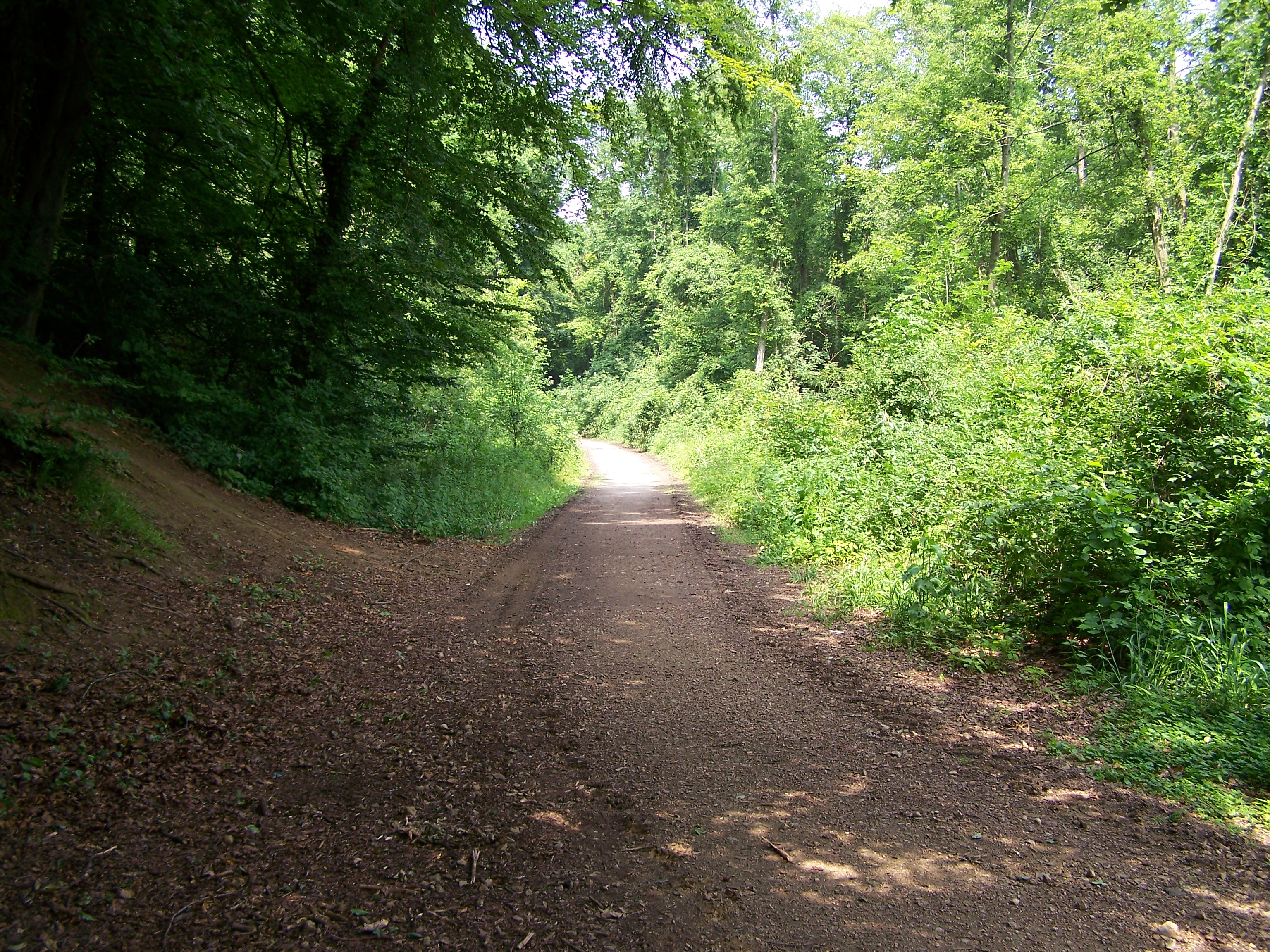 Trasse der Hüggelbahn